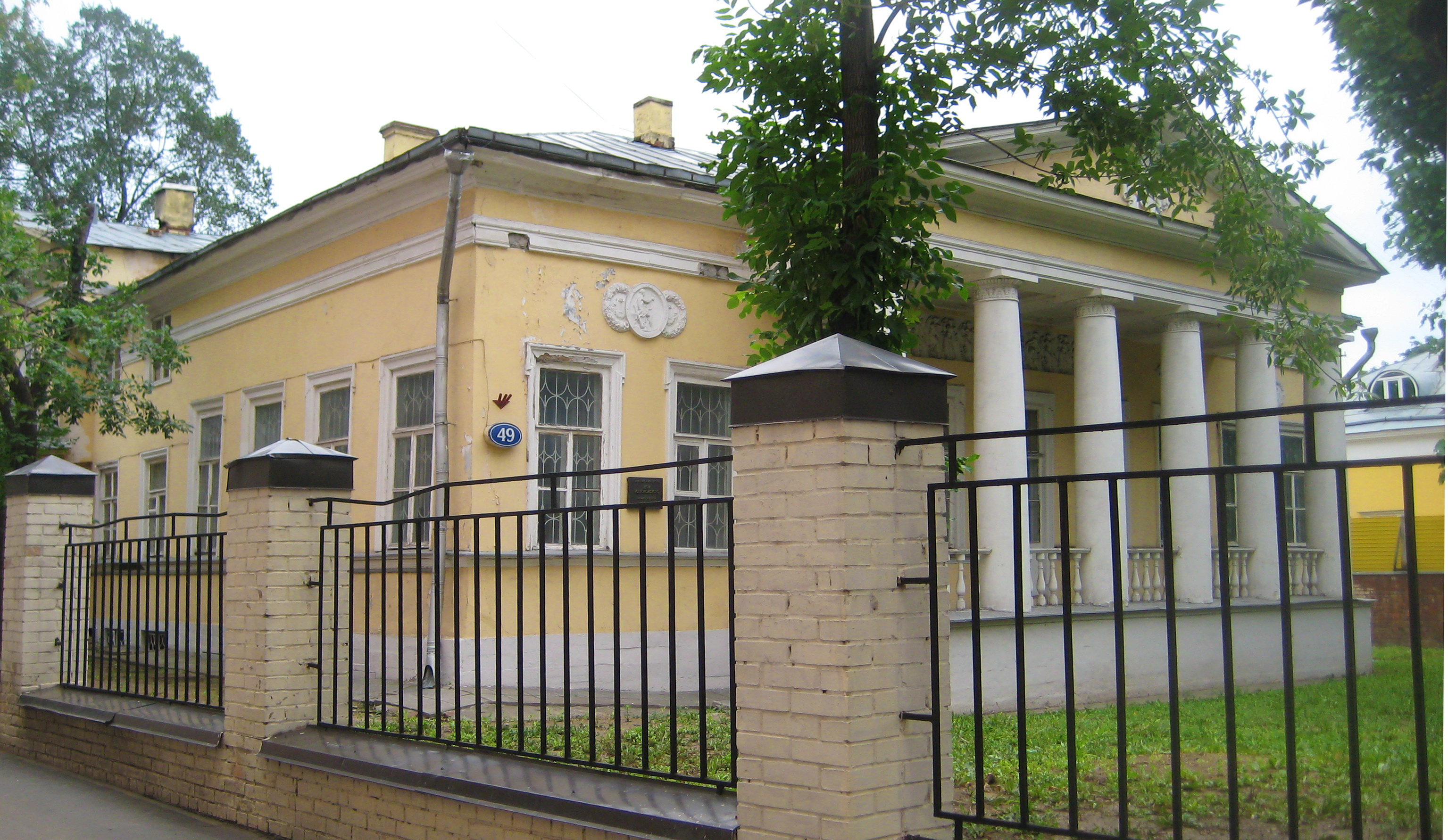 Остоженка. № 49, дом А. В. Всеволожского.